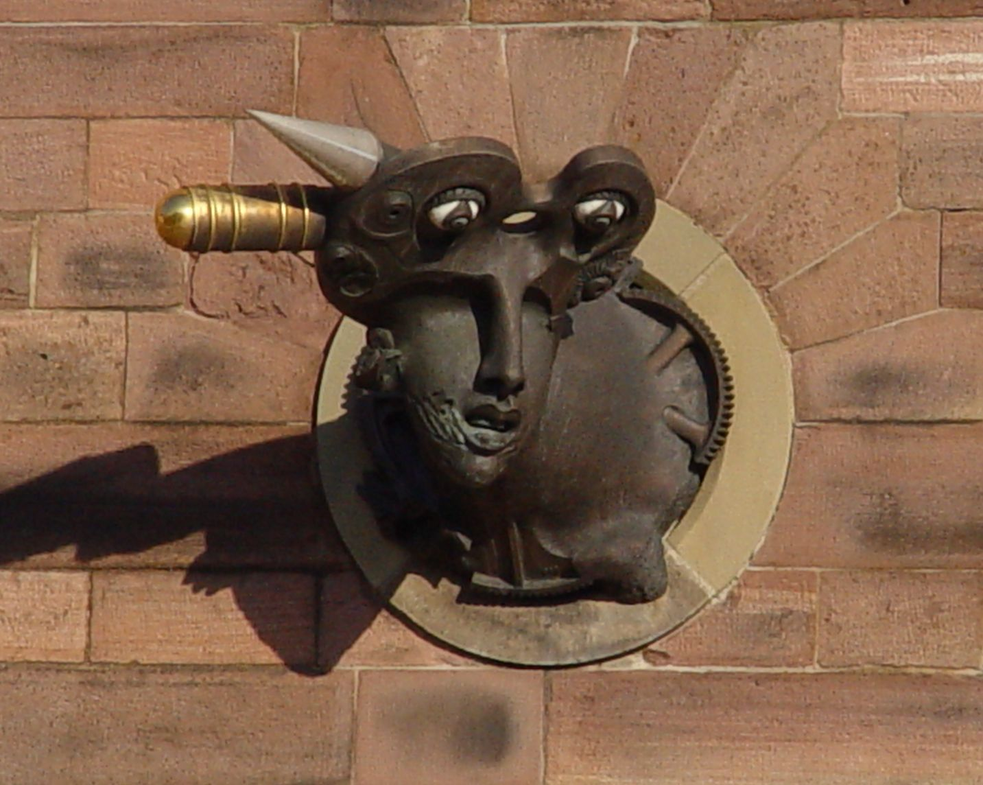 Die „Muse der Bildenden Künste“ von Jürgen Goertz über dem Eingang der Rastatter Fruchthalle.